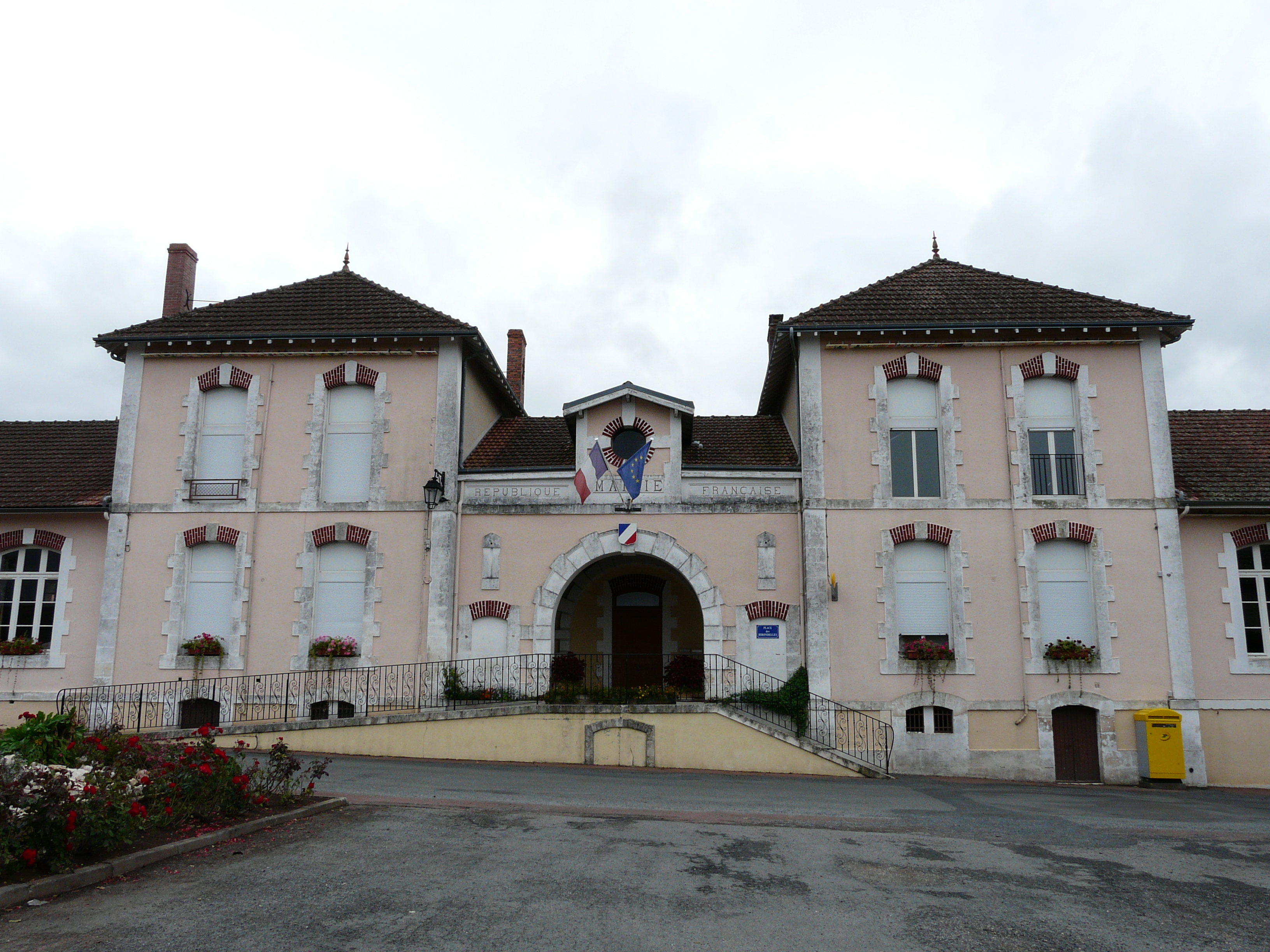 La mairie de Saint-Paul-la-Roche, Dordogne, France